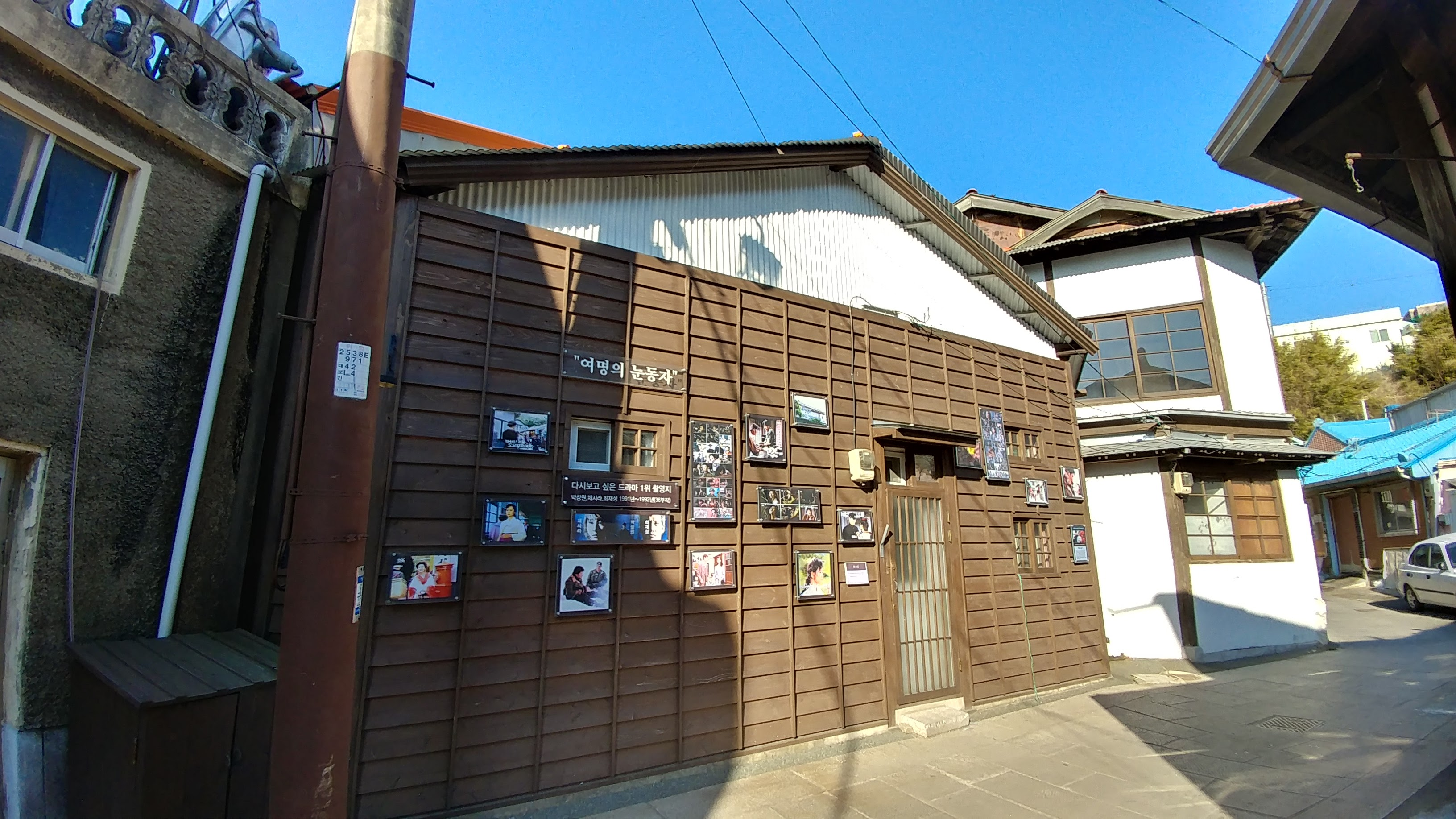 여명의 눈동자 촬영장소가 된 구룡포 일본인 거리의 한 가옥